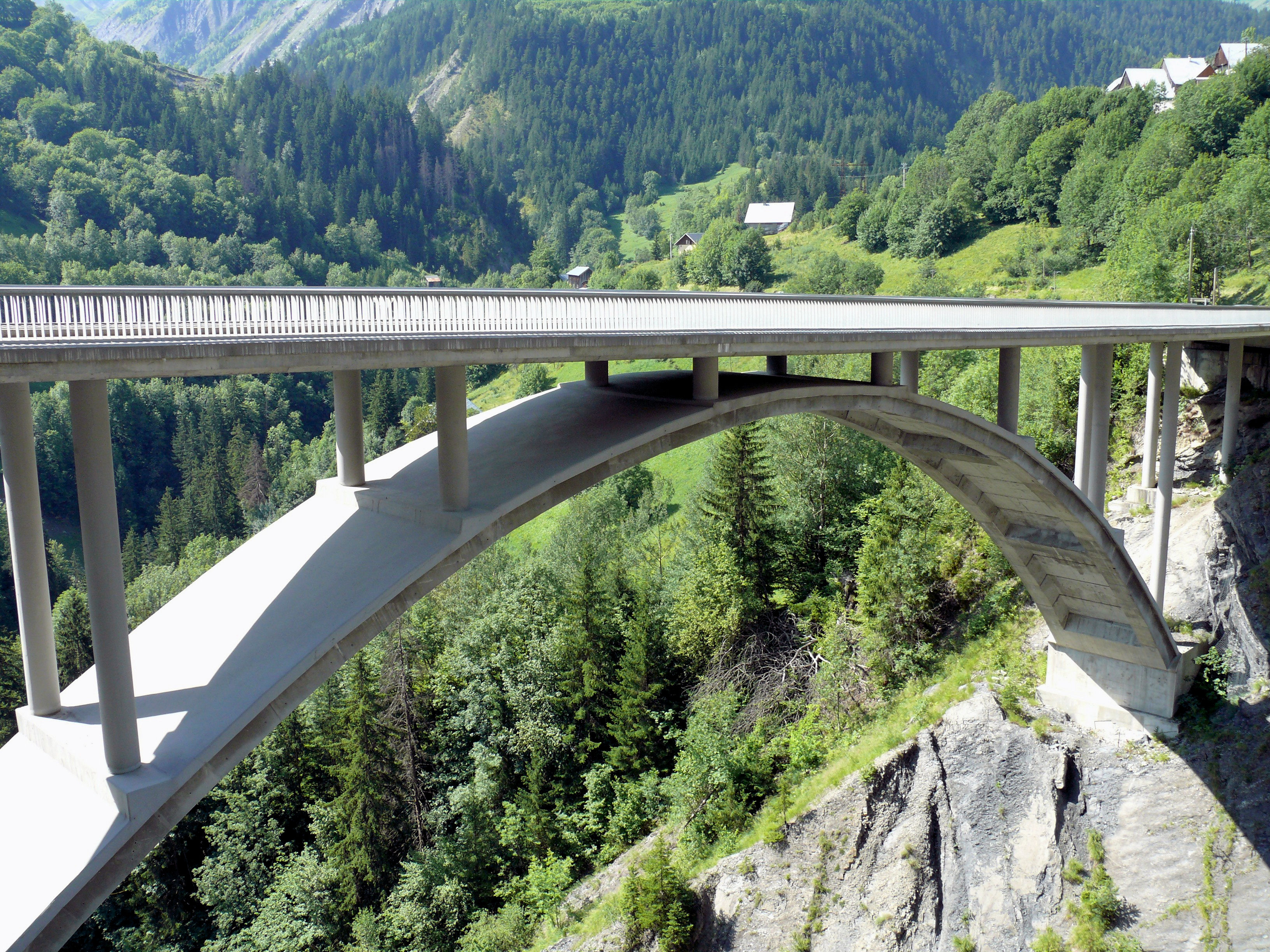 Saint-Jean-d'Arves - Viaduc des Sallanches (1990)